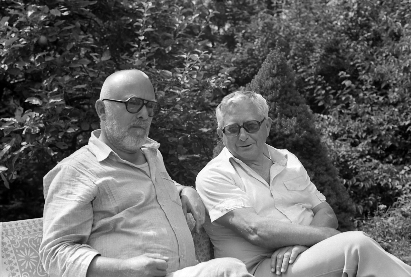 Horst Schönemann (links) deutscher Schauspieler und Regisseur; Gerhard Wolfram (rechts), deutscher Dramaturg, Theaterregisseur und Theaterintendant